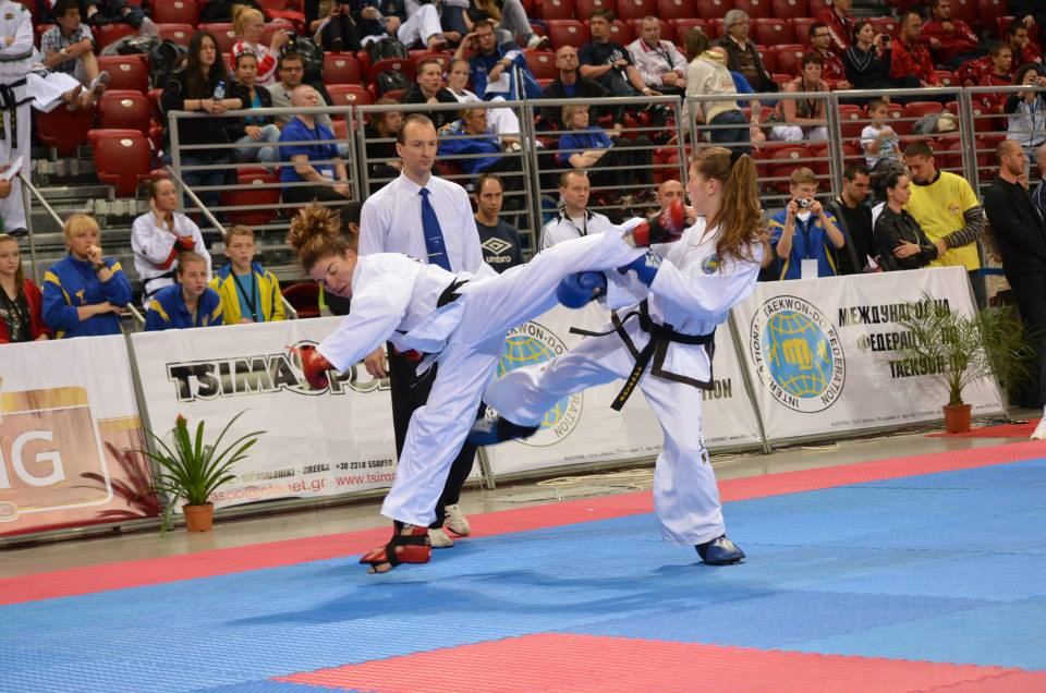 Амалия Колева в среща на спаринг таекуон-до ITF